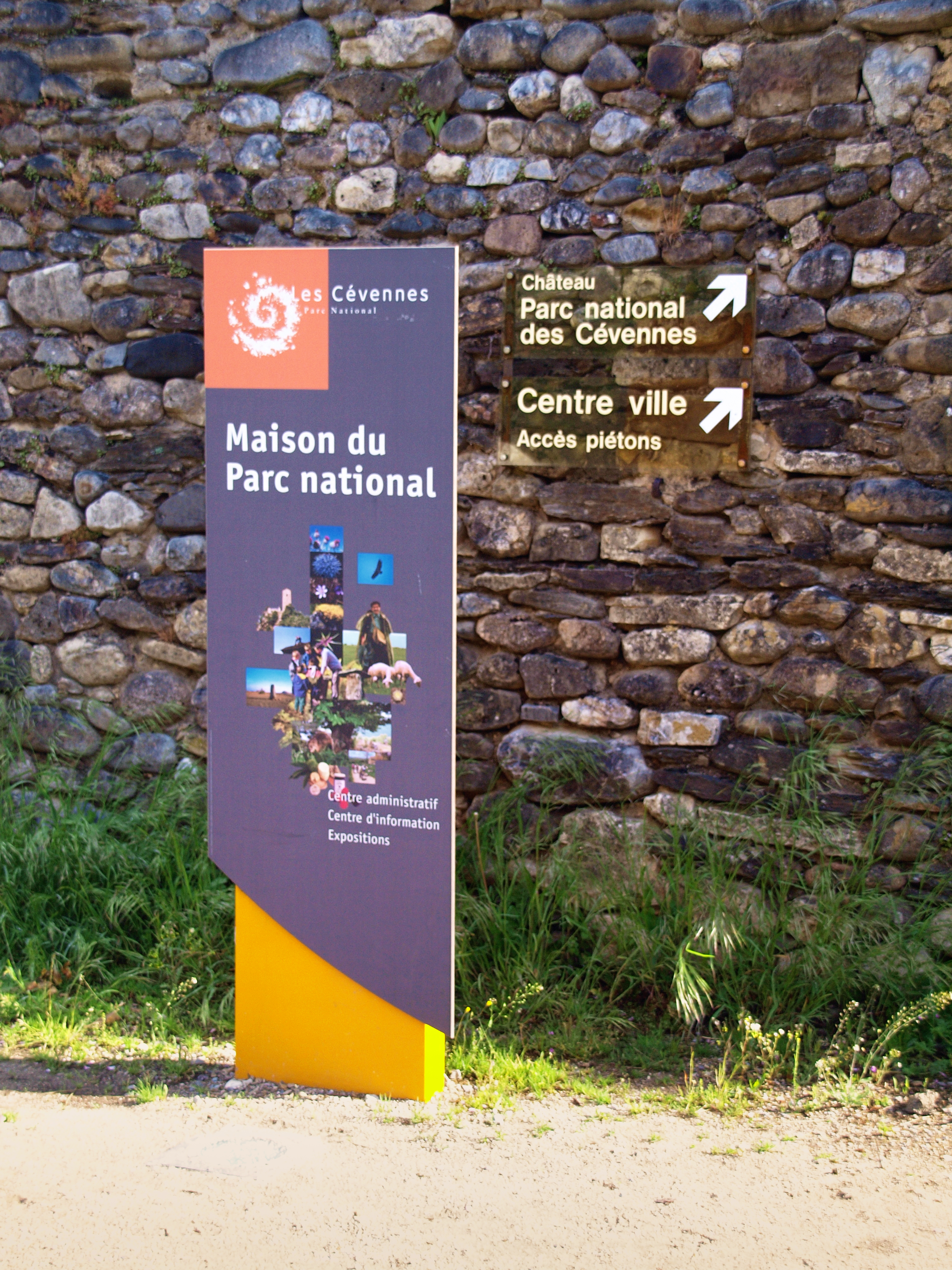 Florac (Lozère) - Panneau Maison du Parc national